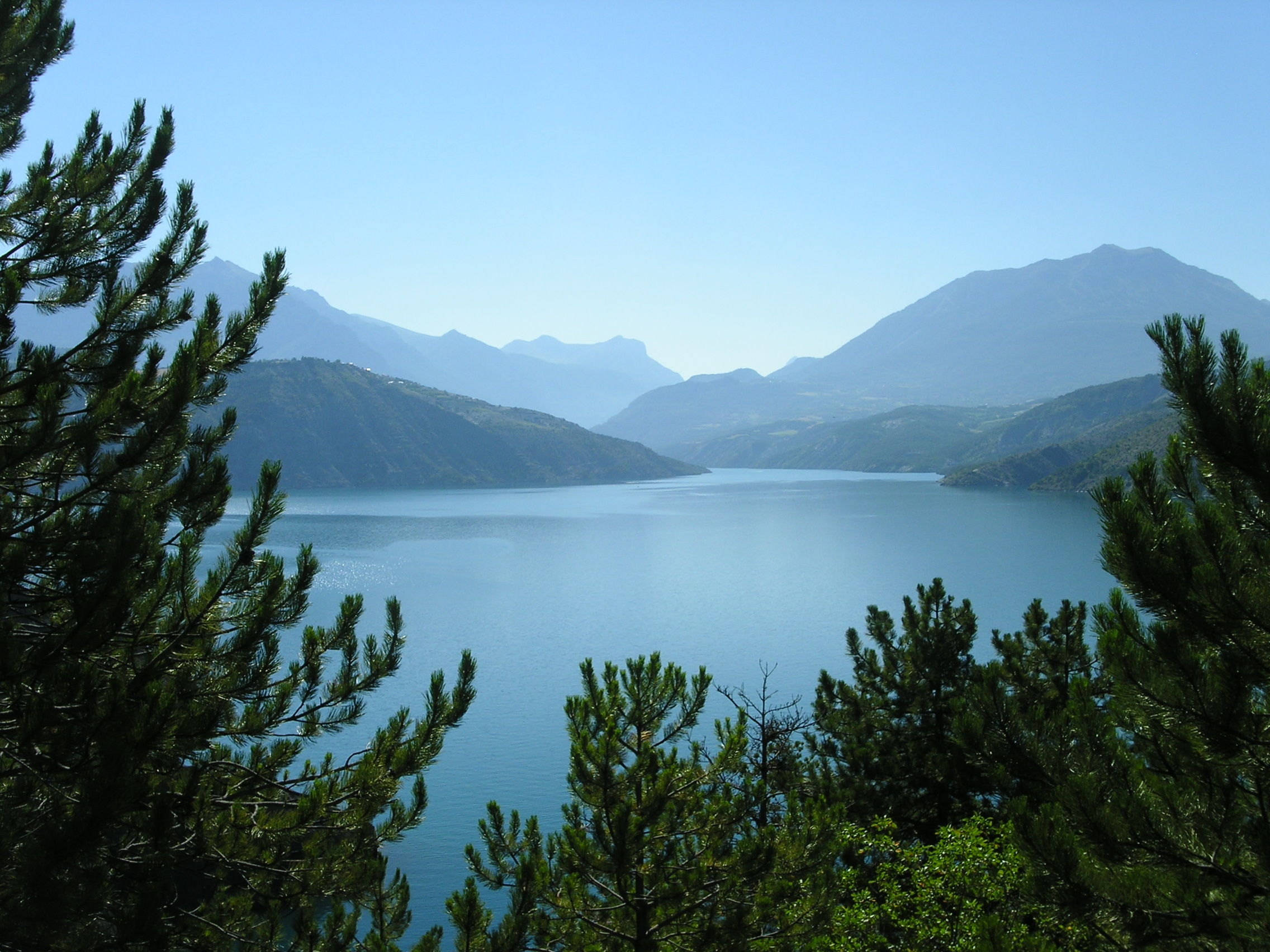 Lac de la Serre-Ponçon